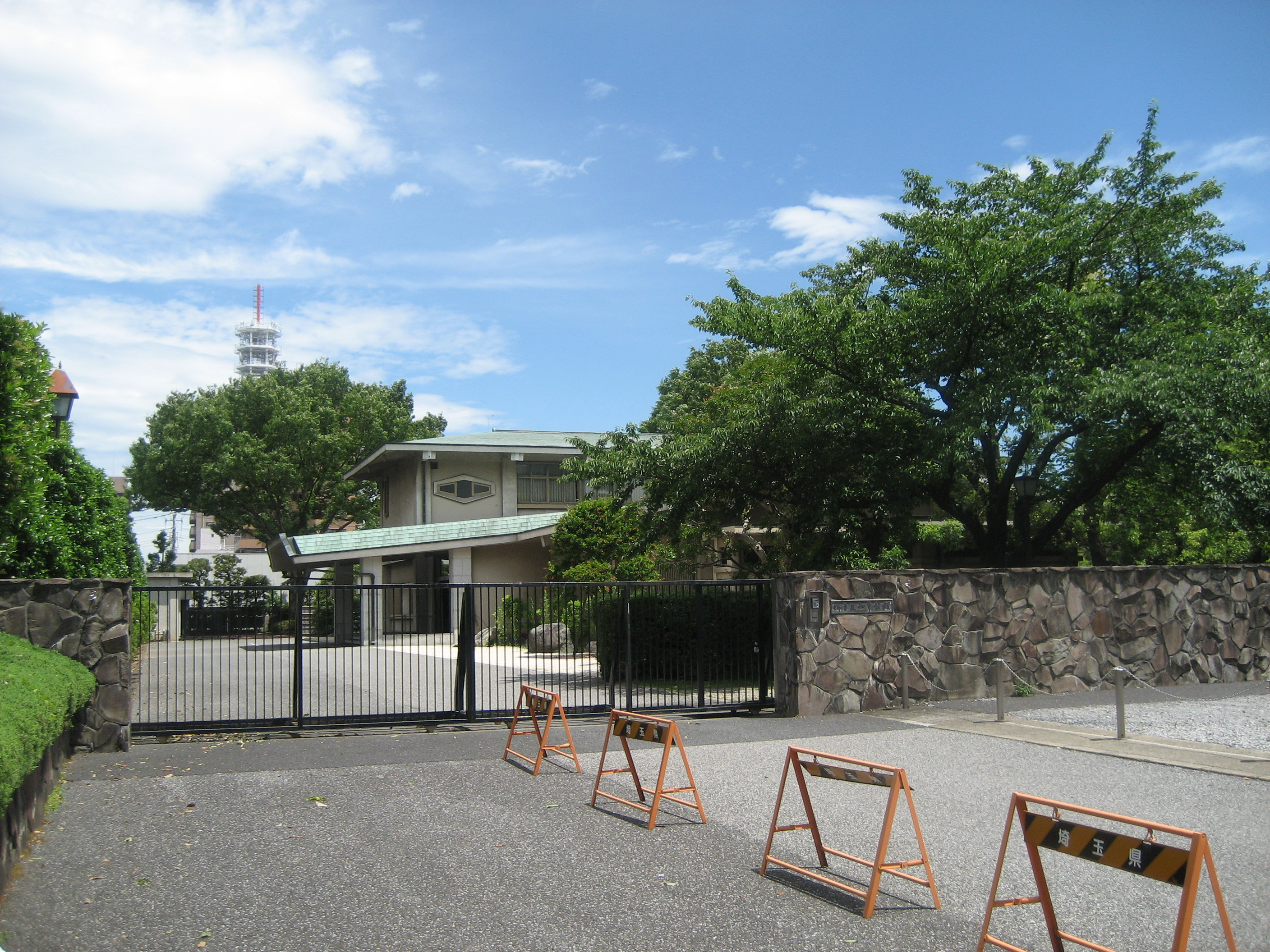 埼玉県知事公館正門